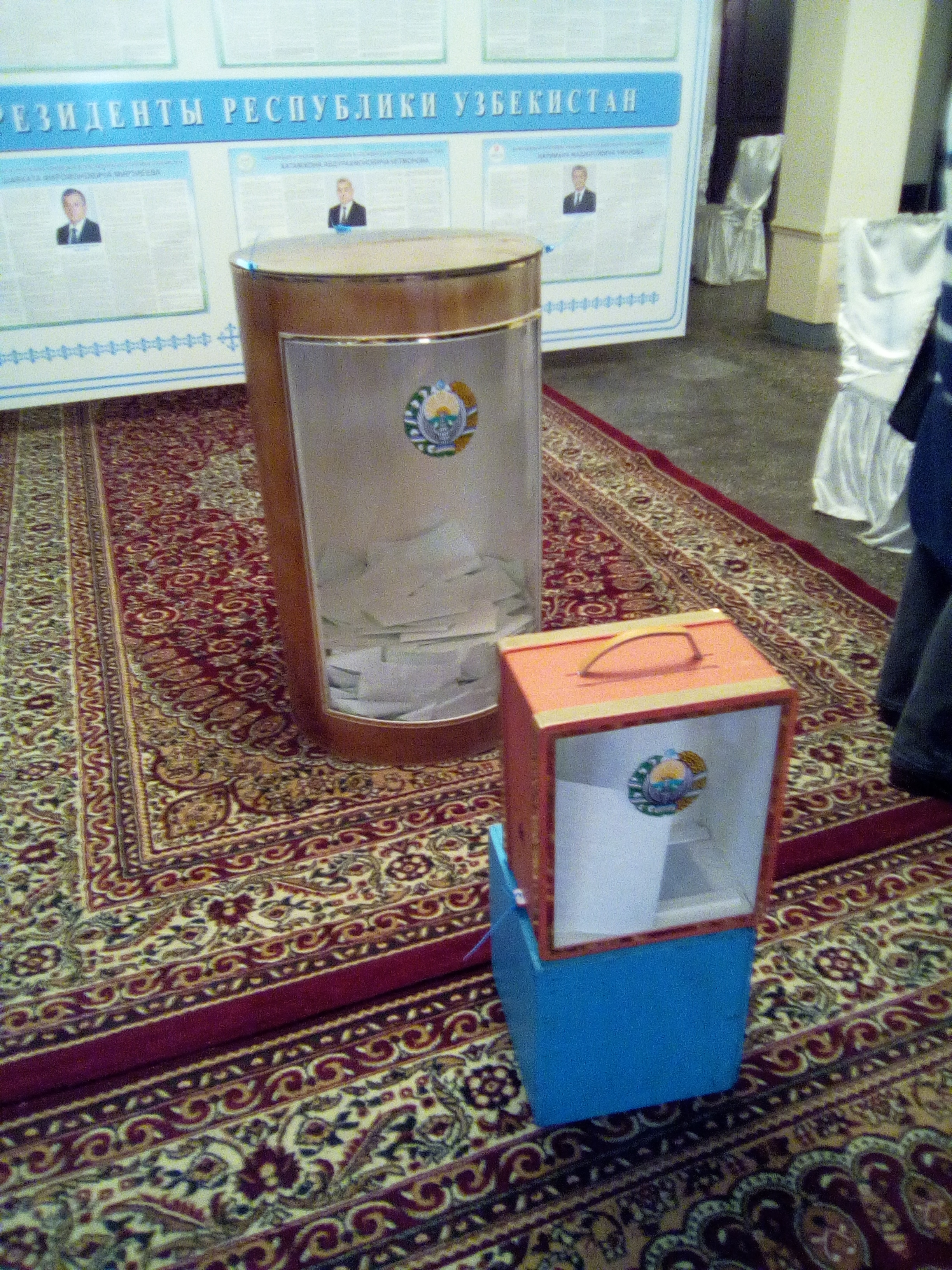 Избирательная урна на 403 участке (г. Ташкент) на президентских выборах в Узбекистане 2016 года